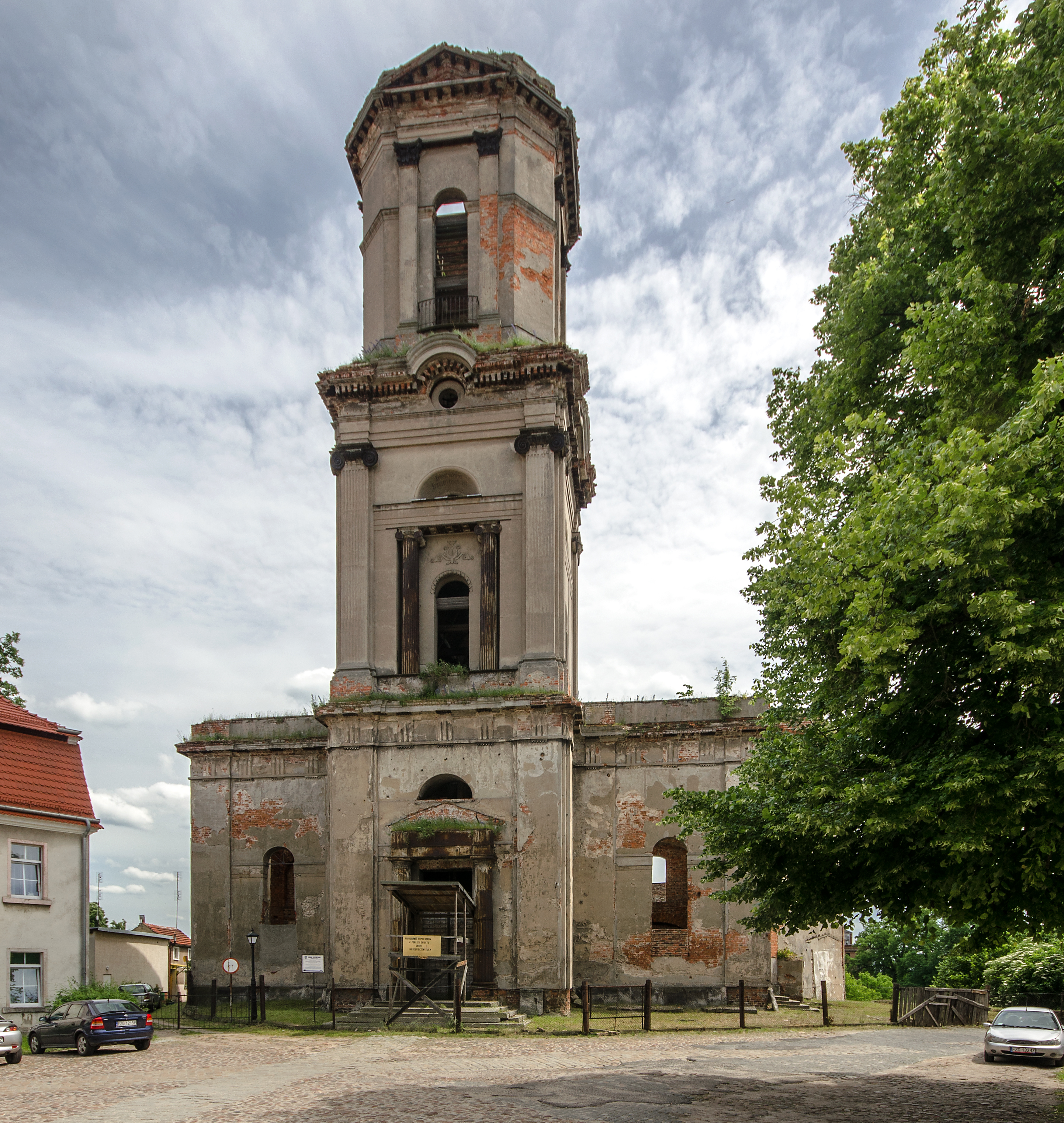 Szprotawa, kościół ewangelicki p.w. Zbawiciela, 1747, 1825